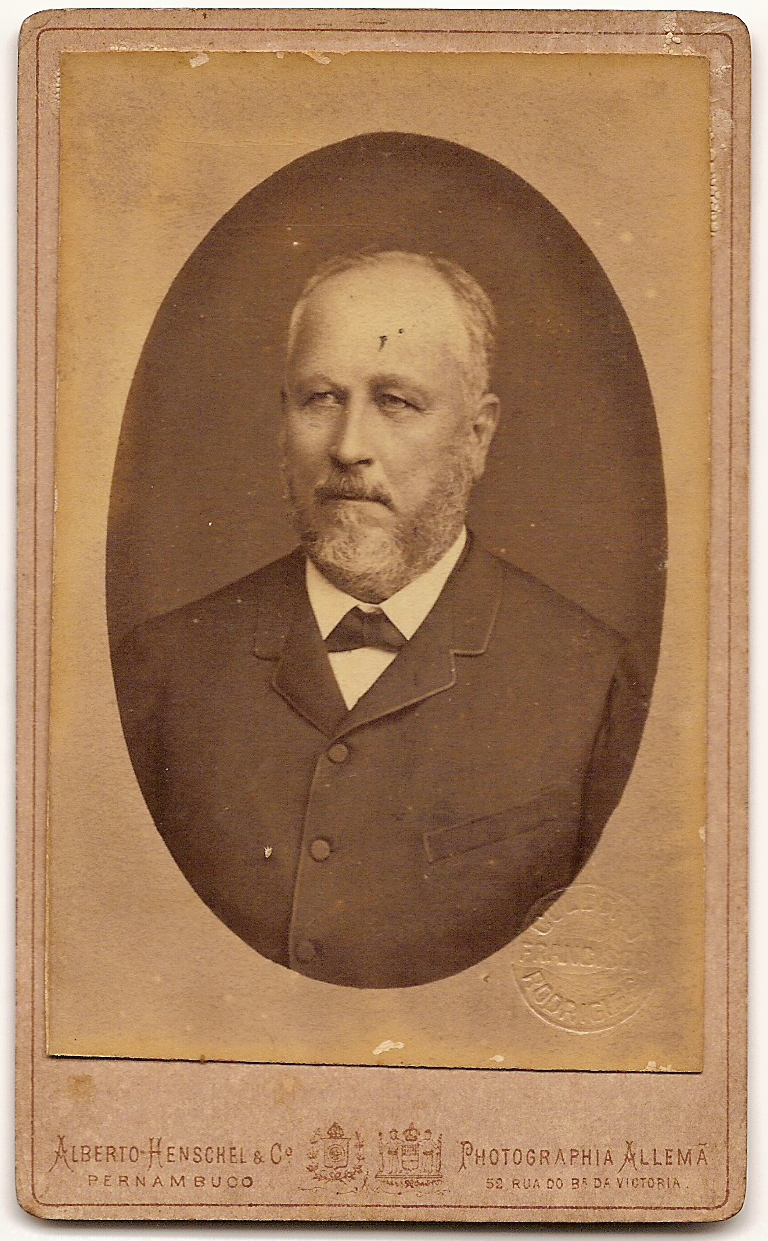 Ambrosio Machado da Cunha Cavalcanti (Engenho Arandú de Baixo, bacharel em 1852, governador de Pernambuco).